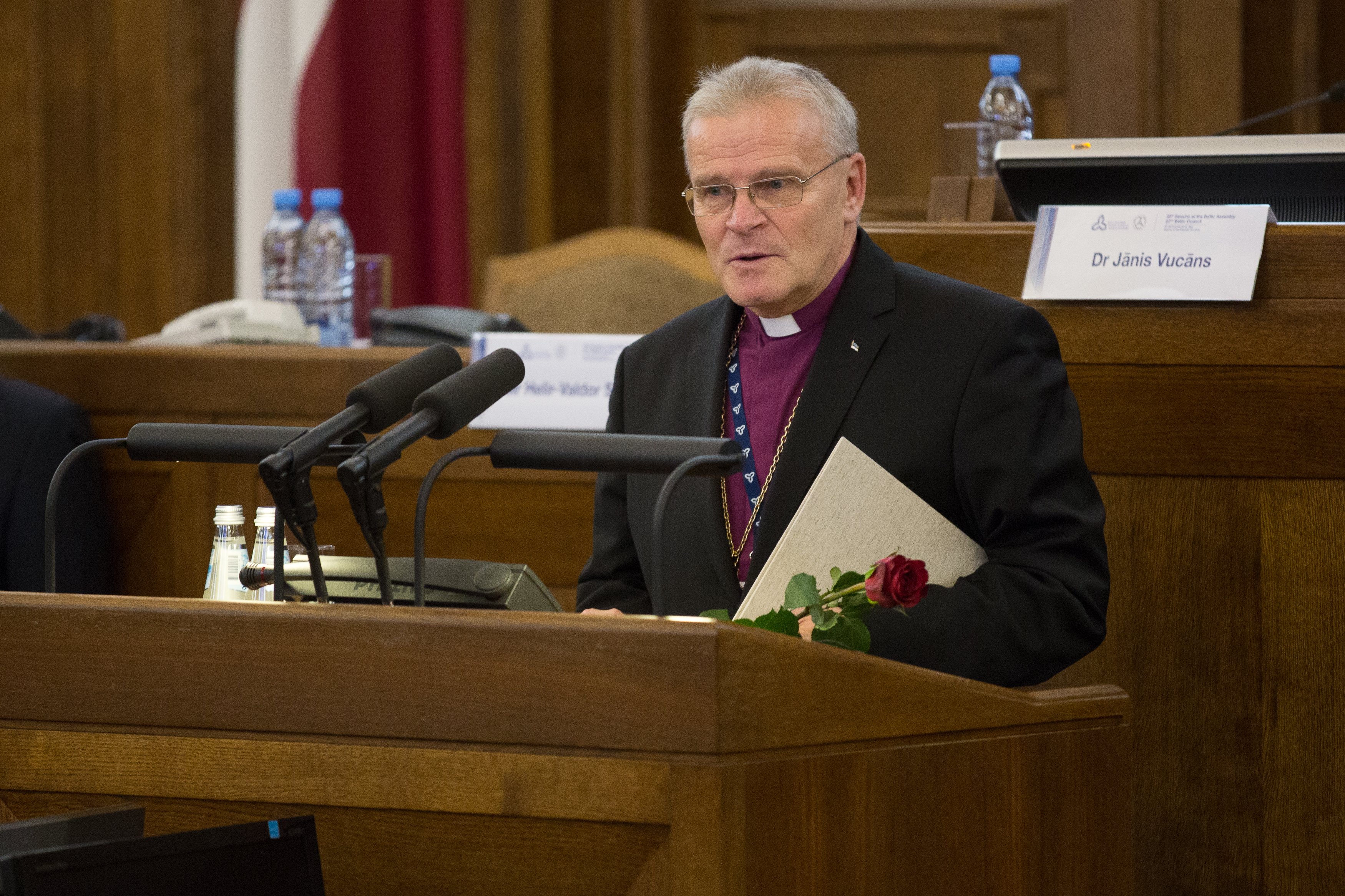 2016.gada 28.oktobris. Saeimas namā pasniedz Baltijas Asamblejas medaļas par īpašiem nopelniem Baltijas valstu vienotības stiprināšanā un sadarbības veicināšanā. Foto: Ernests Dinka, Saeimas Administrācija Izmantošanas noteikumi: saeima.lv/lv/autortiesibas